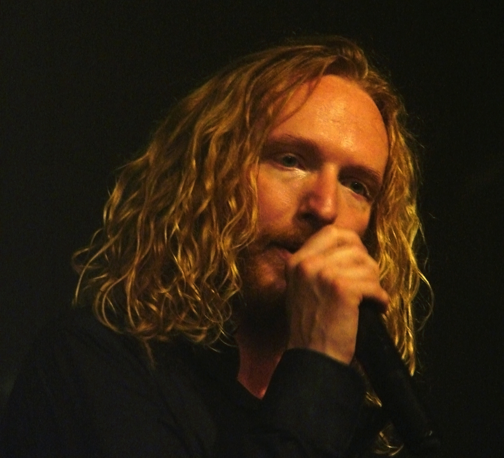 Dark Tranquillity, concert du 12/10/07 à la Locomotive à Paris. Mikael Stanne.